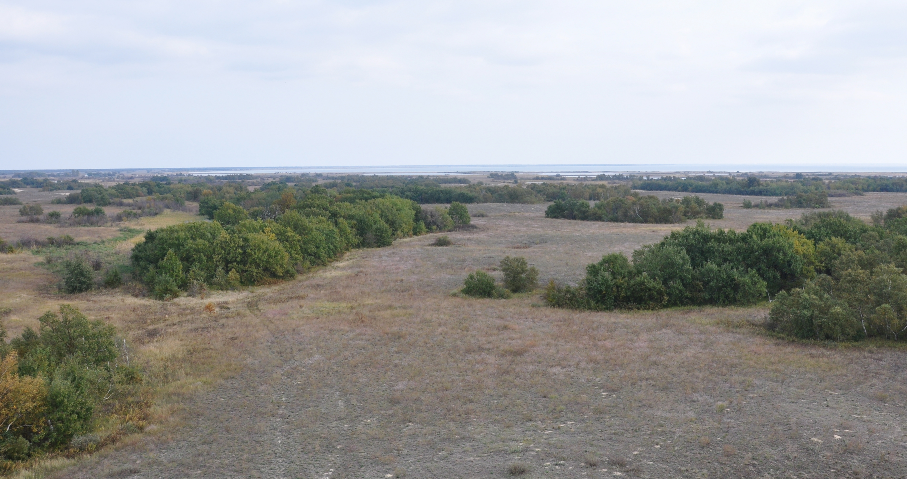 Чорноморський, м. Гола Пристань, вул. Лермонтова,1; Голопристанський район